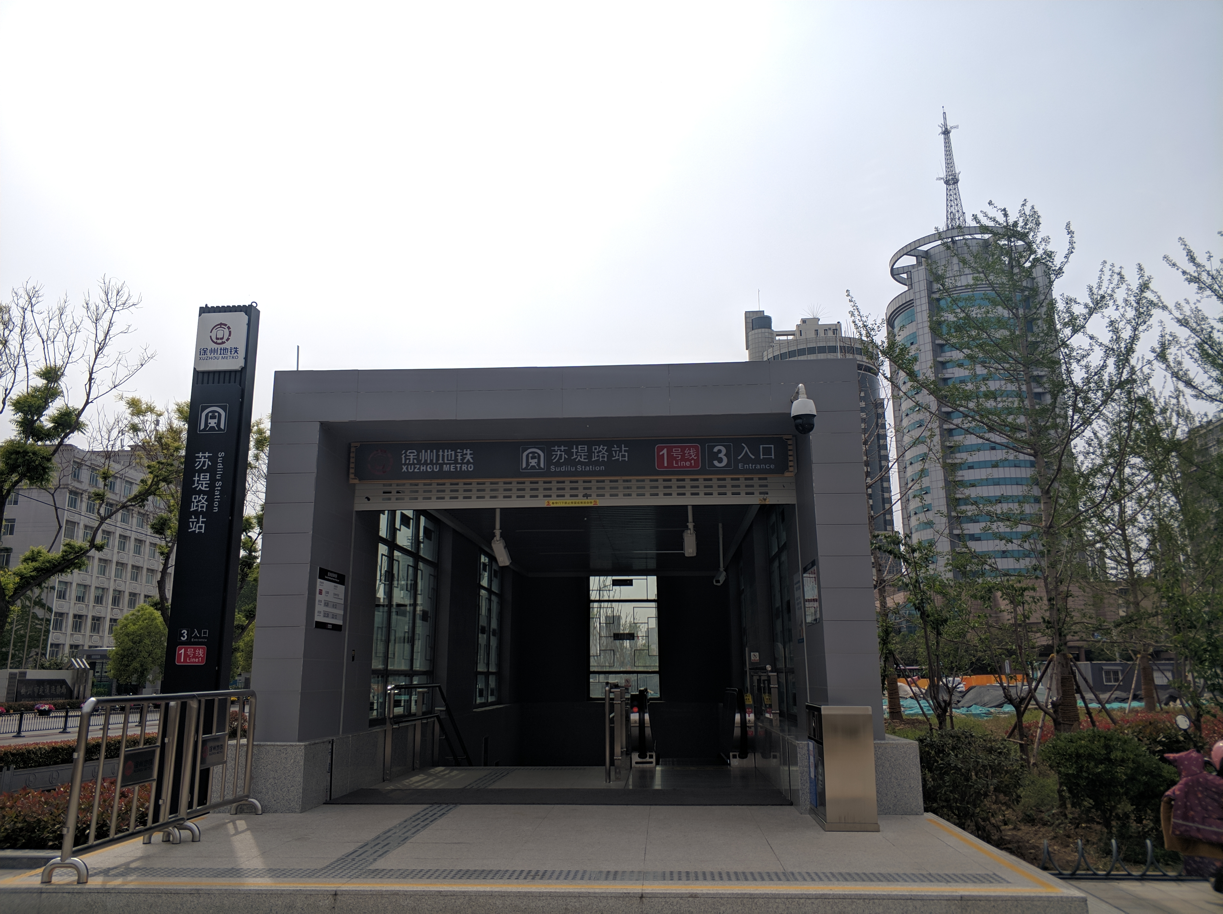 徐州地铁苏堤路站3号出入口